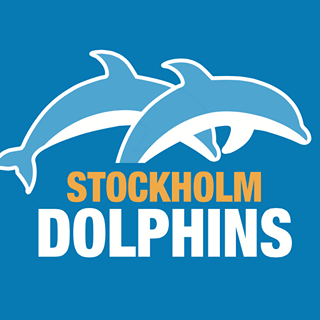 Lagemblem för Stockholm Dolphins Swim Club